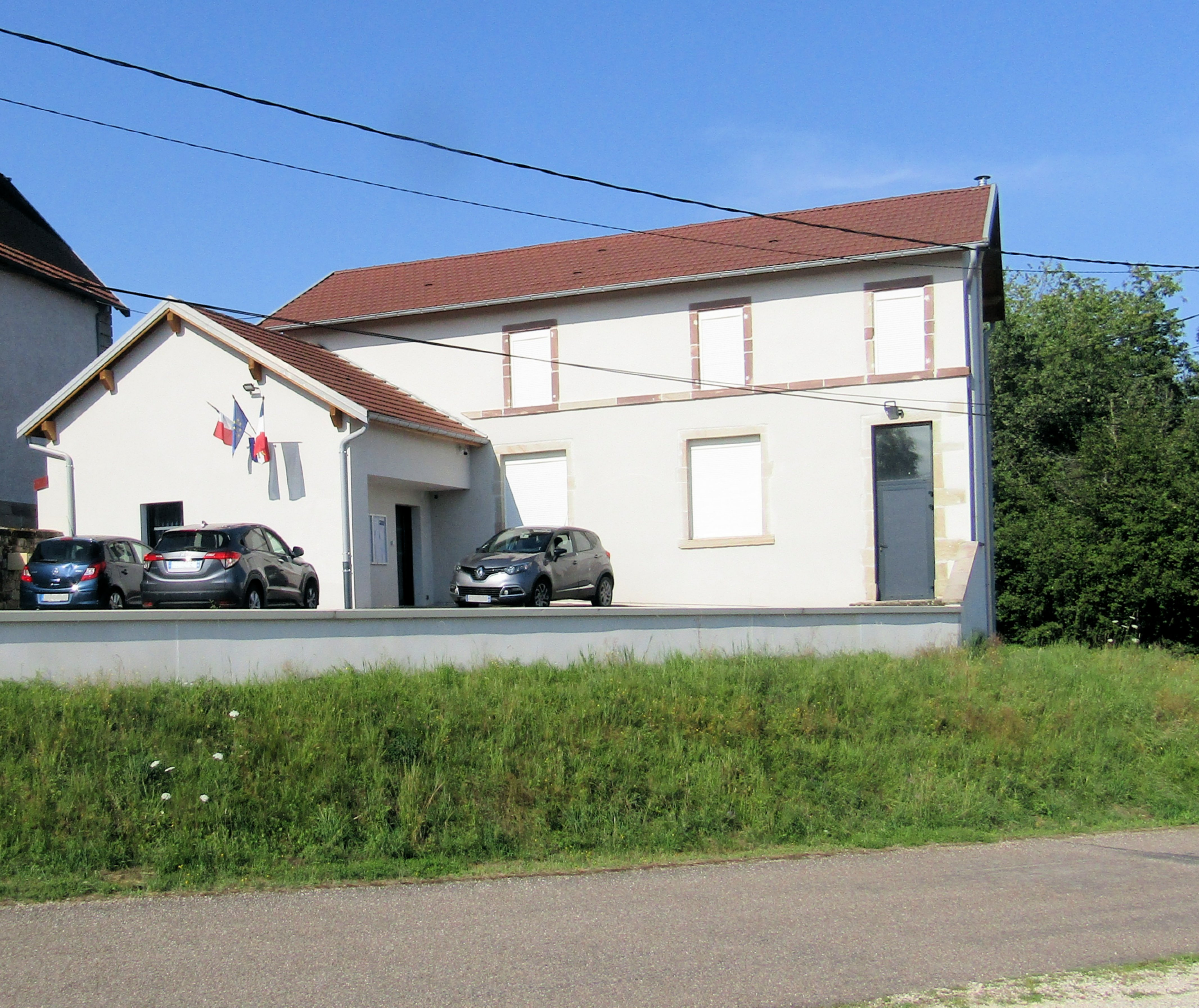 L'église Saint-Laurent àBelrupt